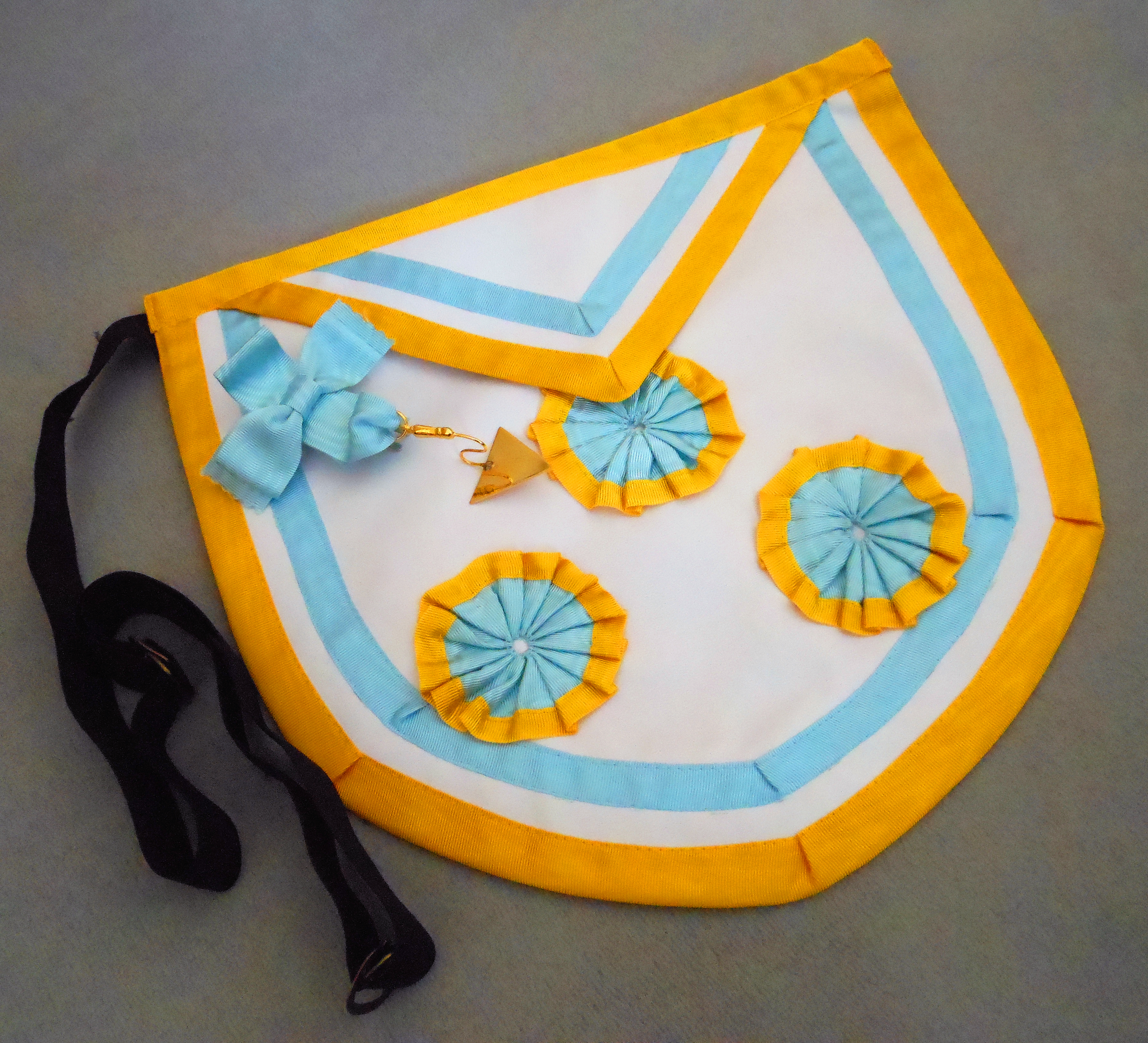 Мастерский запон ложи "Боанергес цур Брудерлибе"